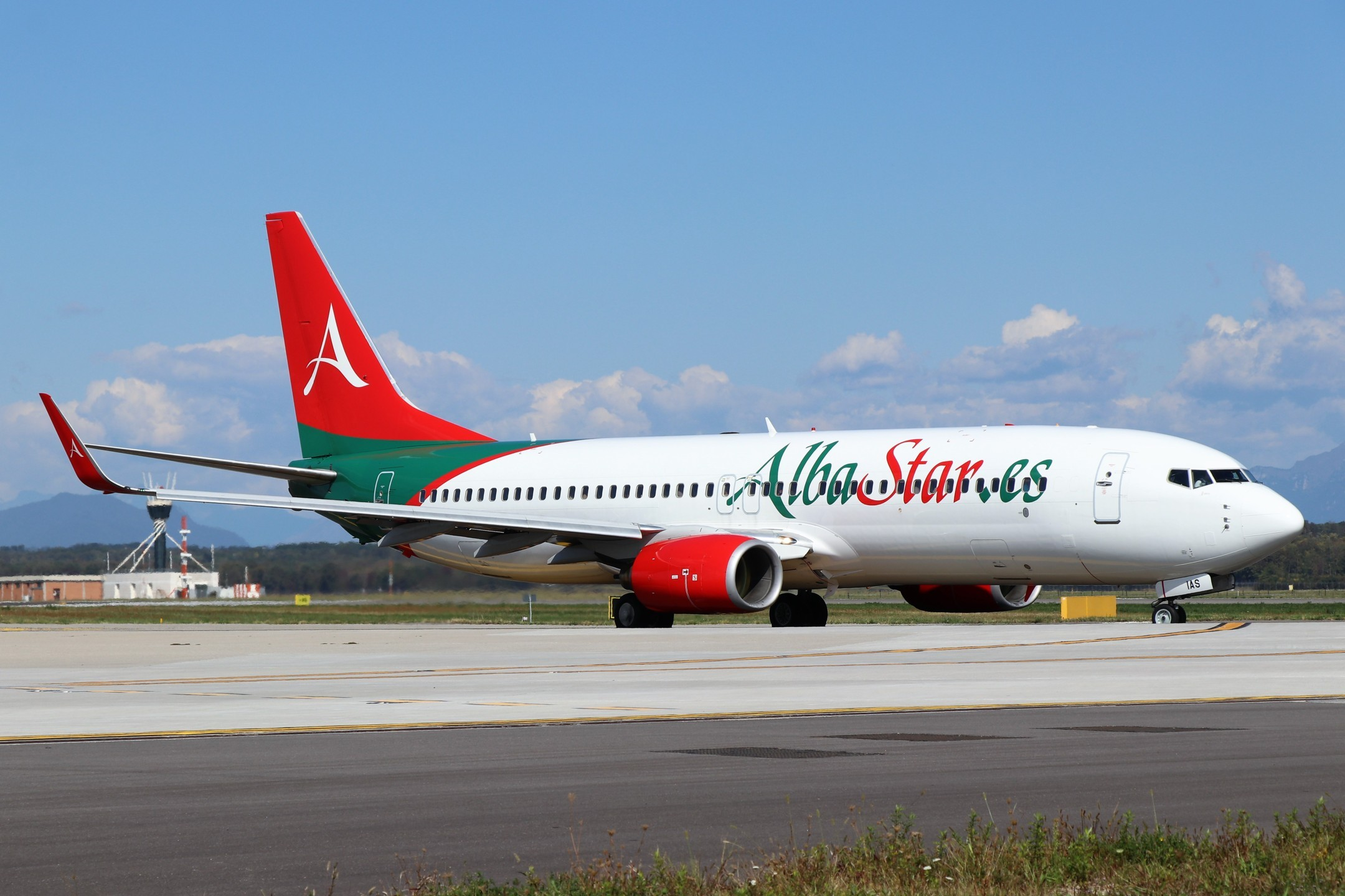 EC-MUB